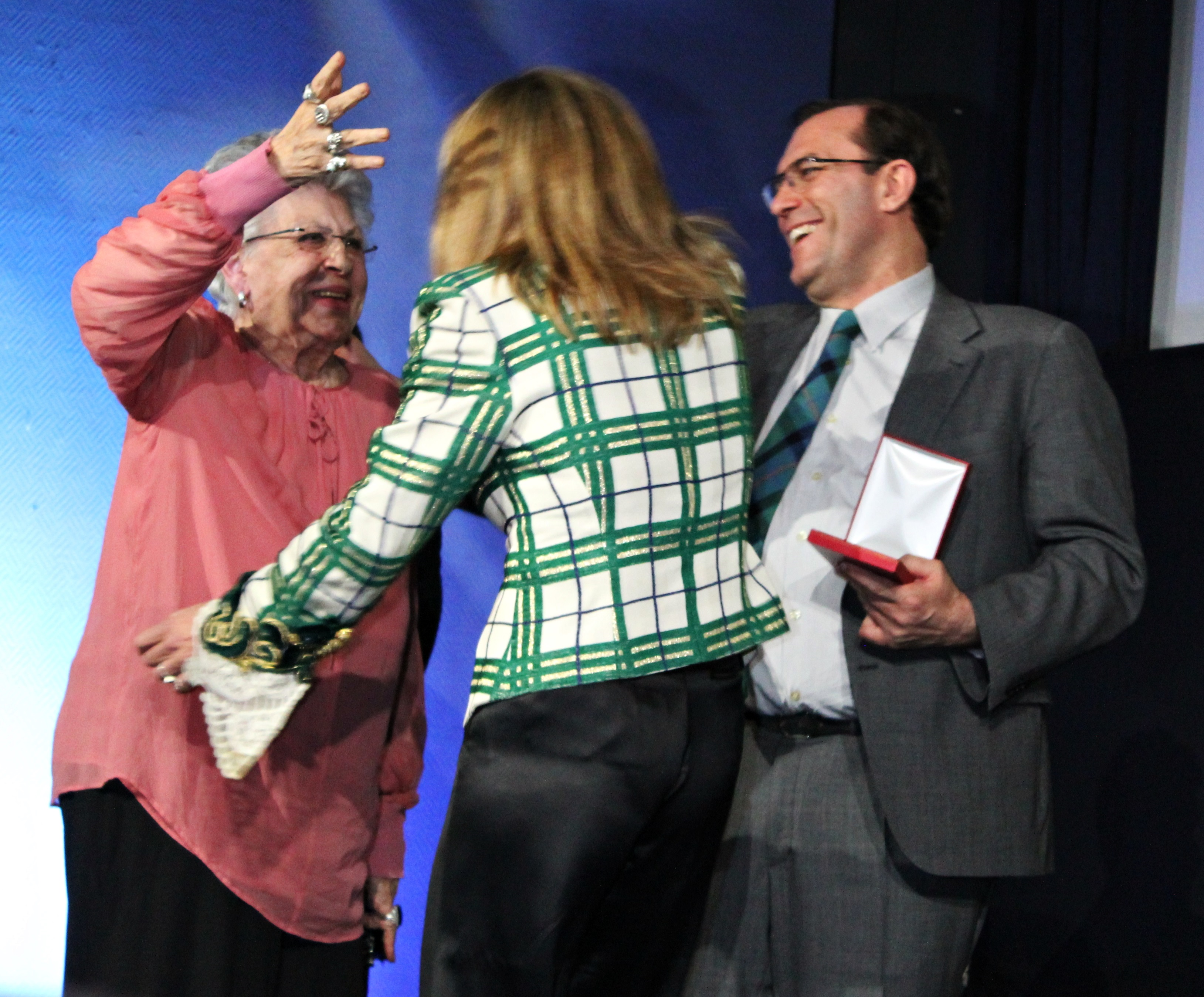 La actriz española Pilar Bardem recibe la Medalla de honor del Círculo de Escritores Cinematográficos de Gloria Scola y Jerónimo José Martín.